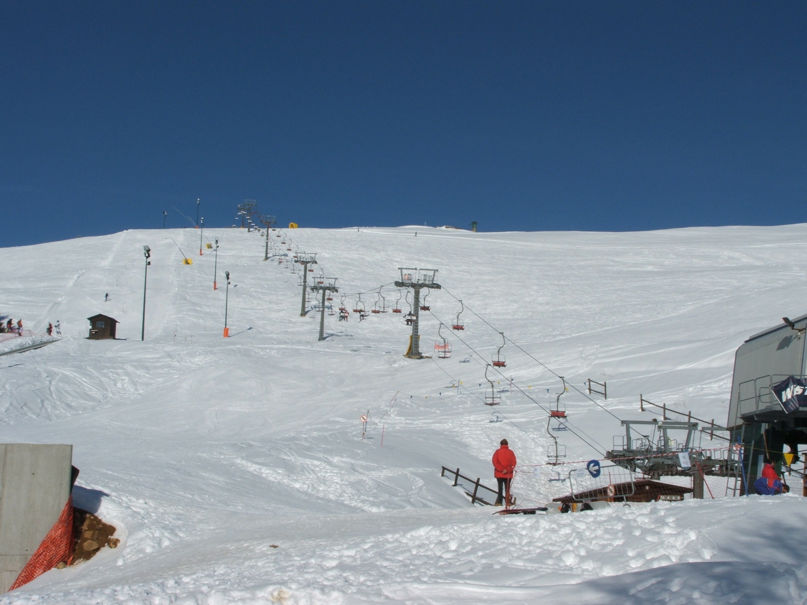 Valle Sessera, zona di Bocchetto Séssera e Bielmonte, Biella (Piemonte, Italia) in inverno